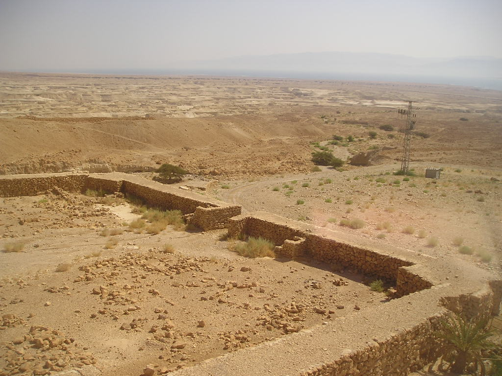 В крепость Массада. Крепость Массада, Израиль.